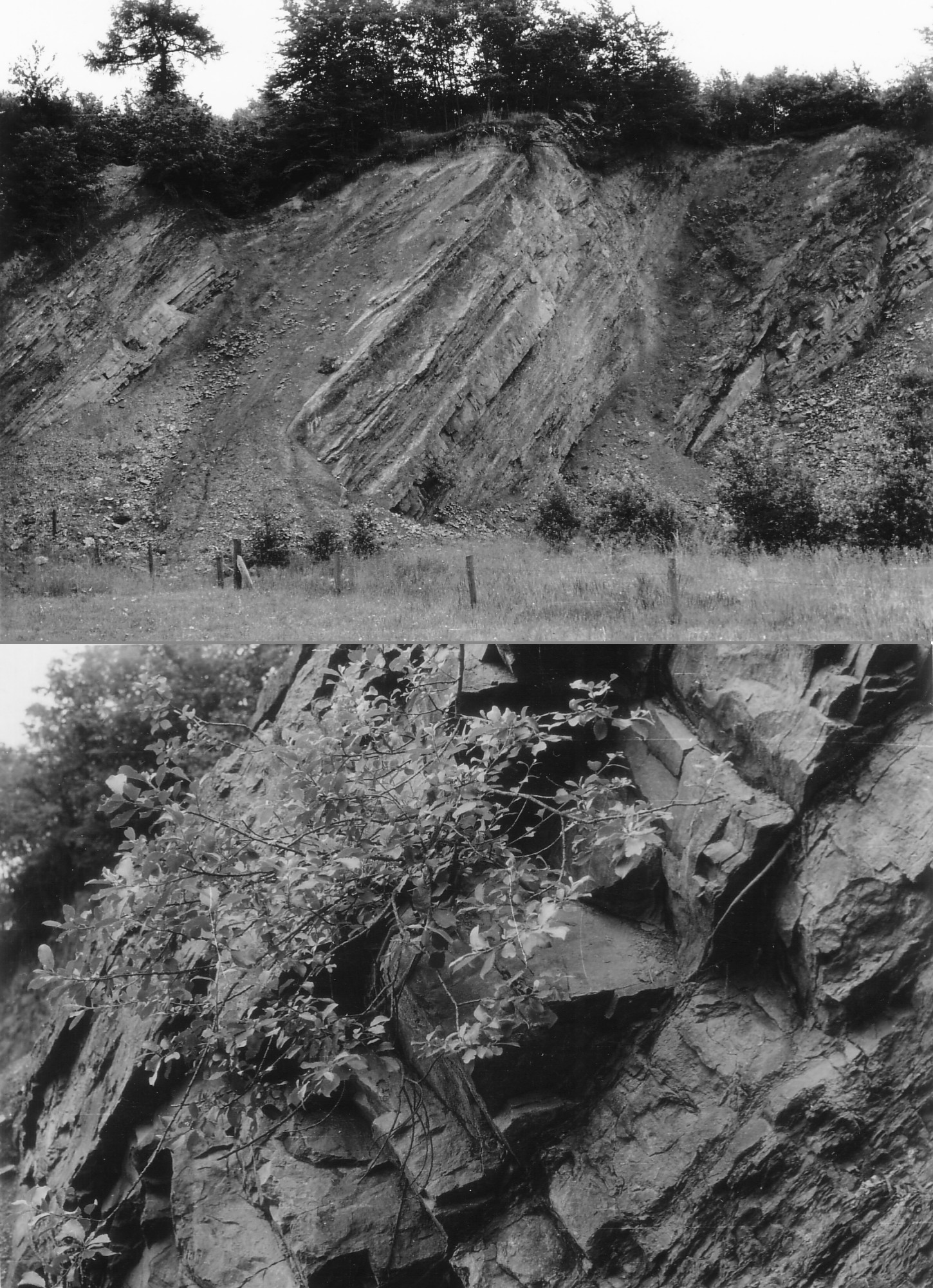 Ehemaliger Steinbruch (Paläologisches Bodendenkmal) südlich der Ziegelei am Westhang des Linken-Berges im Wiehengebirge. Der Aufschluss zeigt etwa einen Nord-Süd-Schnitt des Linken mit von Süd nach Nord um 45° (scheinbar) fallenden Schichten; er mag die geologische Ausgangssituation bei Bildung der Pforte zur Oldendorfer Schweiz verdeutlichen sowie die geologische Beschaffenheit der Nordegge. Der Wechsel harter und weicher Schichten begünstigt die Erosion erheblich, wie sie im oberen Teilbild auf kleiner Skala angedeutet ist, vgl. Bildung von Schichtstufen. Gute Natursteine wurden aus den Stufenbildnern gewonnen, s. unten. Wirtschaftliche Bedeutung: Der Steinbruch lieferte der 1904 gegründeten Dampfziegelei Schieferton; auch gebrannter und gelöschter Kalk sowie Bruchsteine wurden angeboten. In Loren einer Bremsbahn gelangte das Material auf kurzem, steilem Wege zur Ziegelei. 1937 war Schieferton genügender Qualität nicht mehr vorhanden und die entferntere Tongrube mit der ehemaligen Drahtseilbahnstation wurde erschlossen an der Bergstraße, Preußisch Oldendorf.[1] ↑ Rolf Momburg, Ziegeleien überall. Die Entwicklung des Ziegeleiwesens im Minden-Lübbecker Land und in der angrenzenden Nachbarschaft. Reihe: Mindener Beiträge 28. Minden: Mindener Geschichtsverein 2000, S. 150 f.